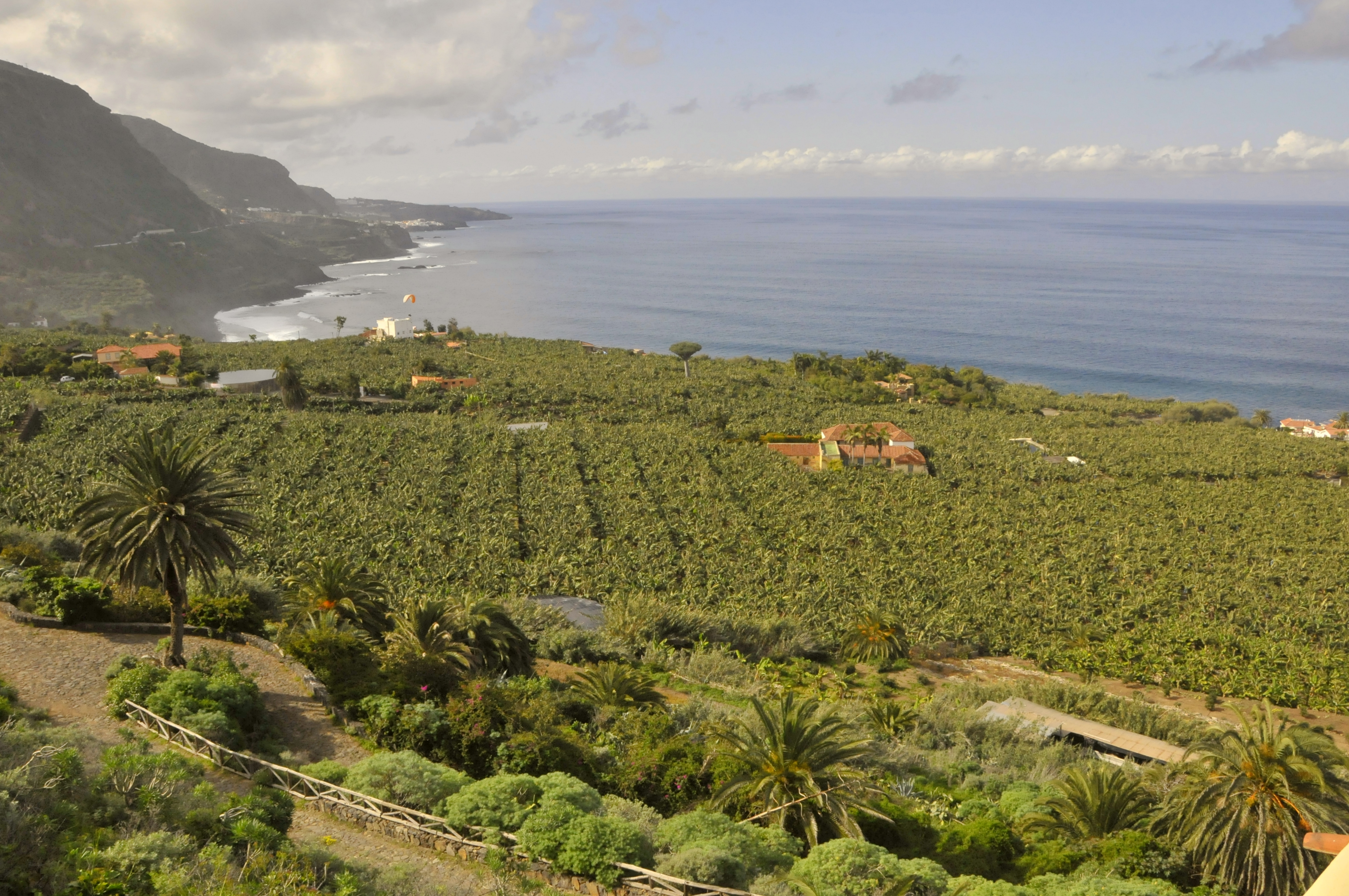 Mirador de San Pedro, Los Realejos, Teneriffa